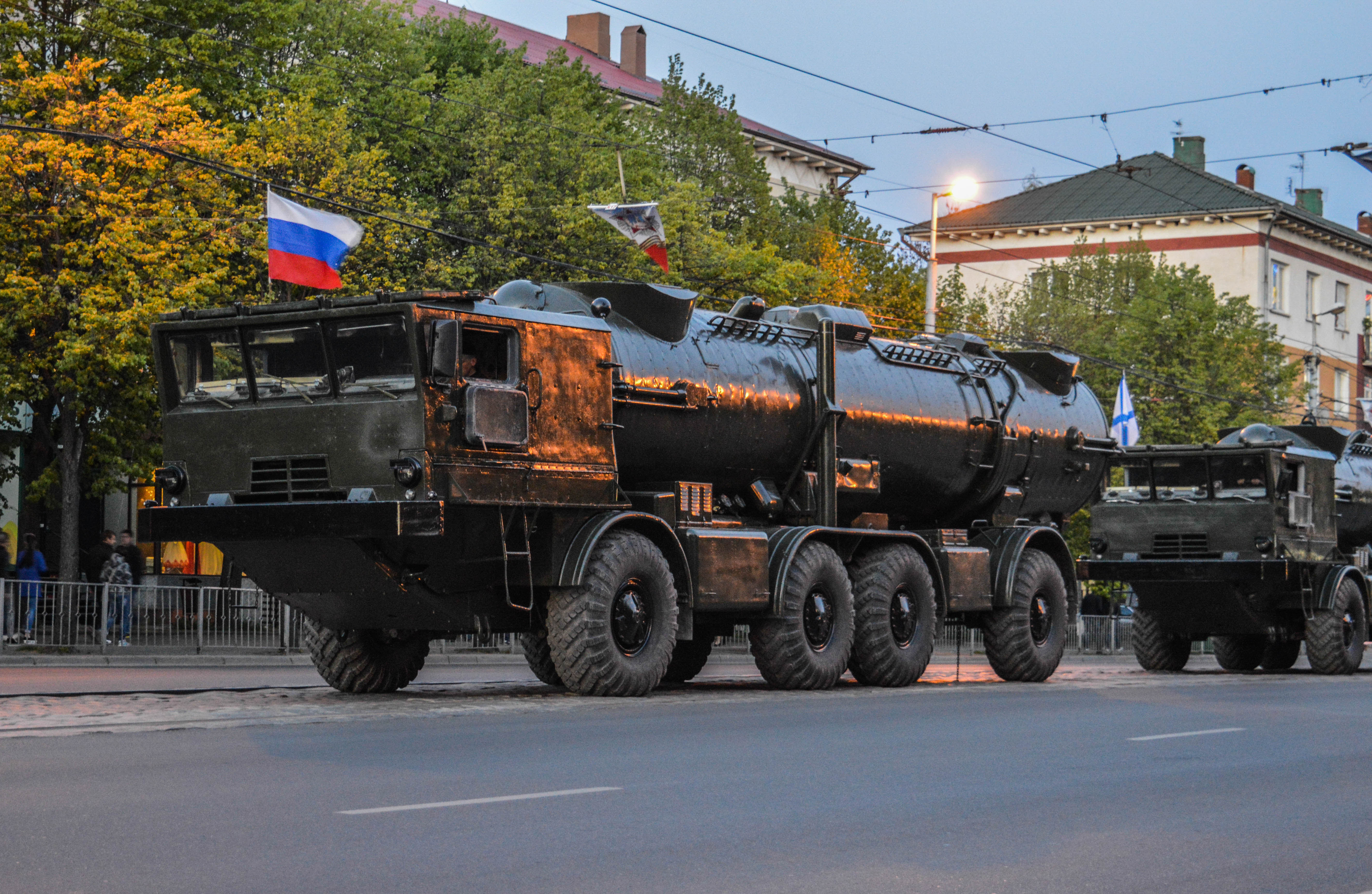 береговой противокорабельный ракетный комплекс Редут на репетиции парада в Калининграде